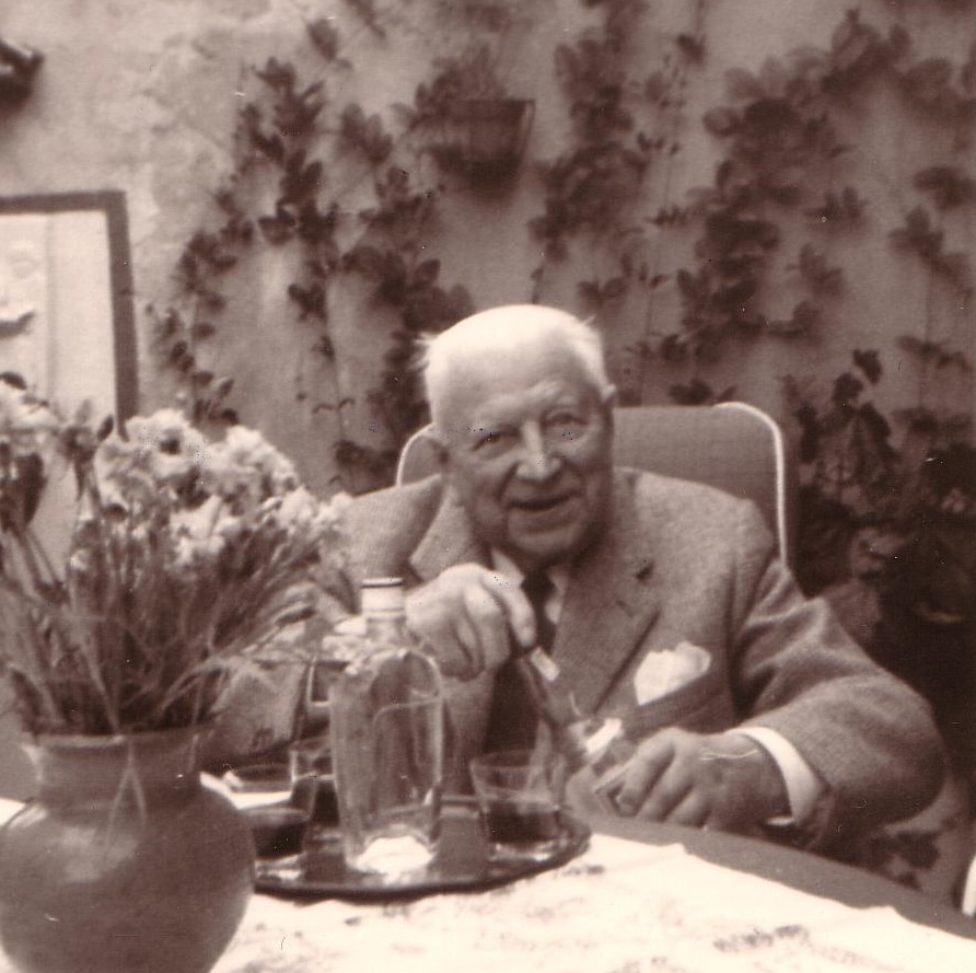 Fotografie von Herbert Neumann (1888-1976)